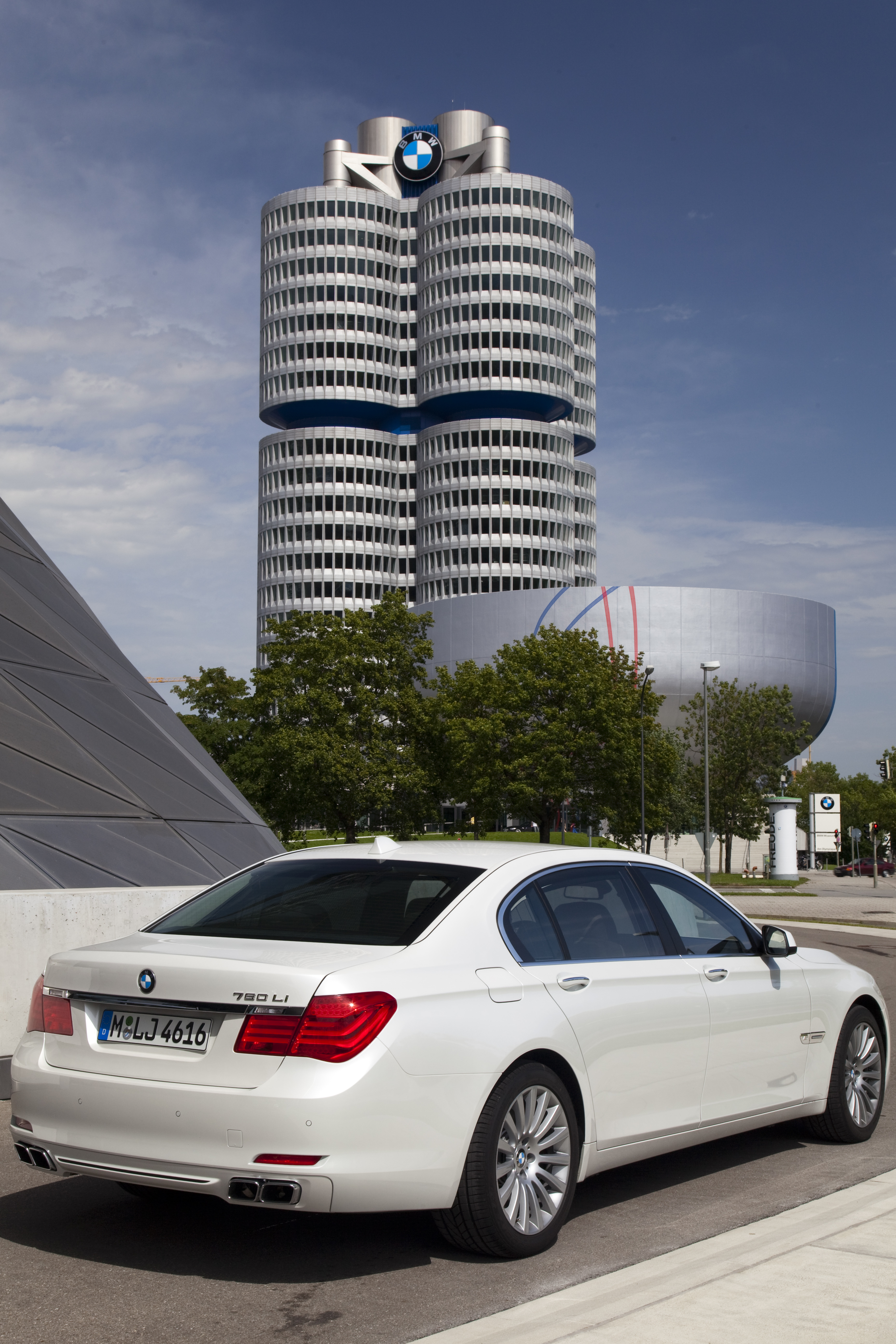 BMW 760Li (Modell F02) in München vor der BMW Konzernzentrale; rechteckige Endrohre am Heck des BMW 760Li lassen die V12-Variante erkennen